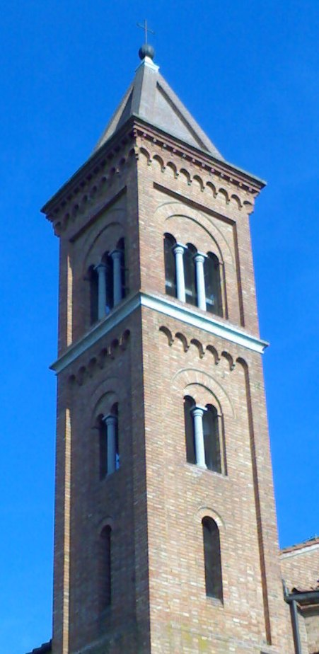 Campanile della Chiesa del Sacro Cuore di Montepulciano Stazione (Siena)